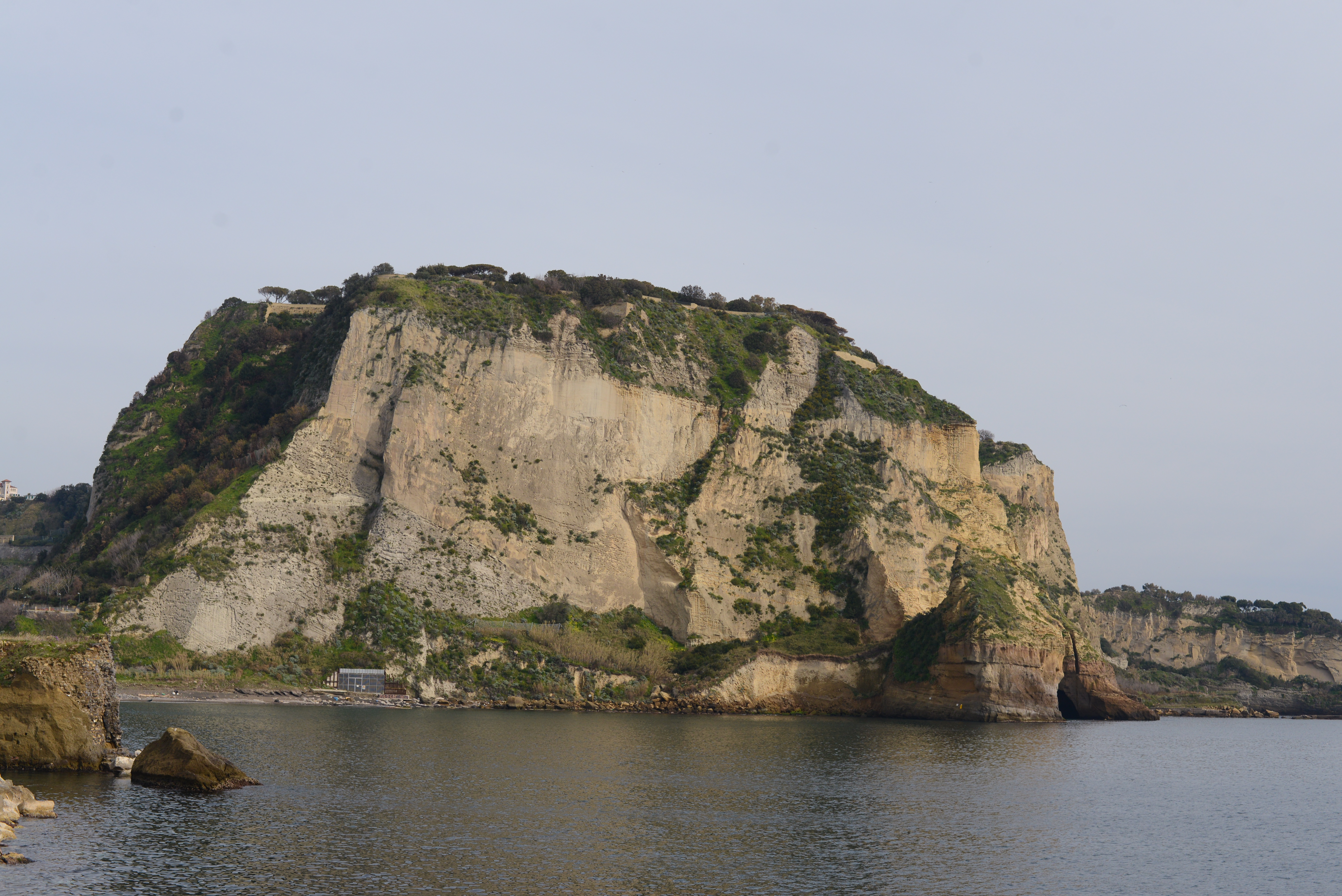 Capo Posillipo visto da Nisida